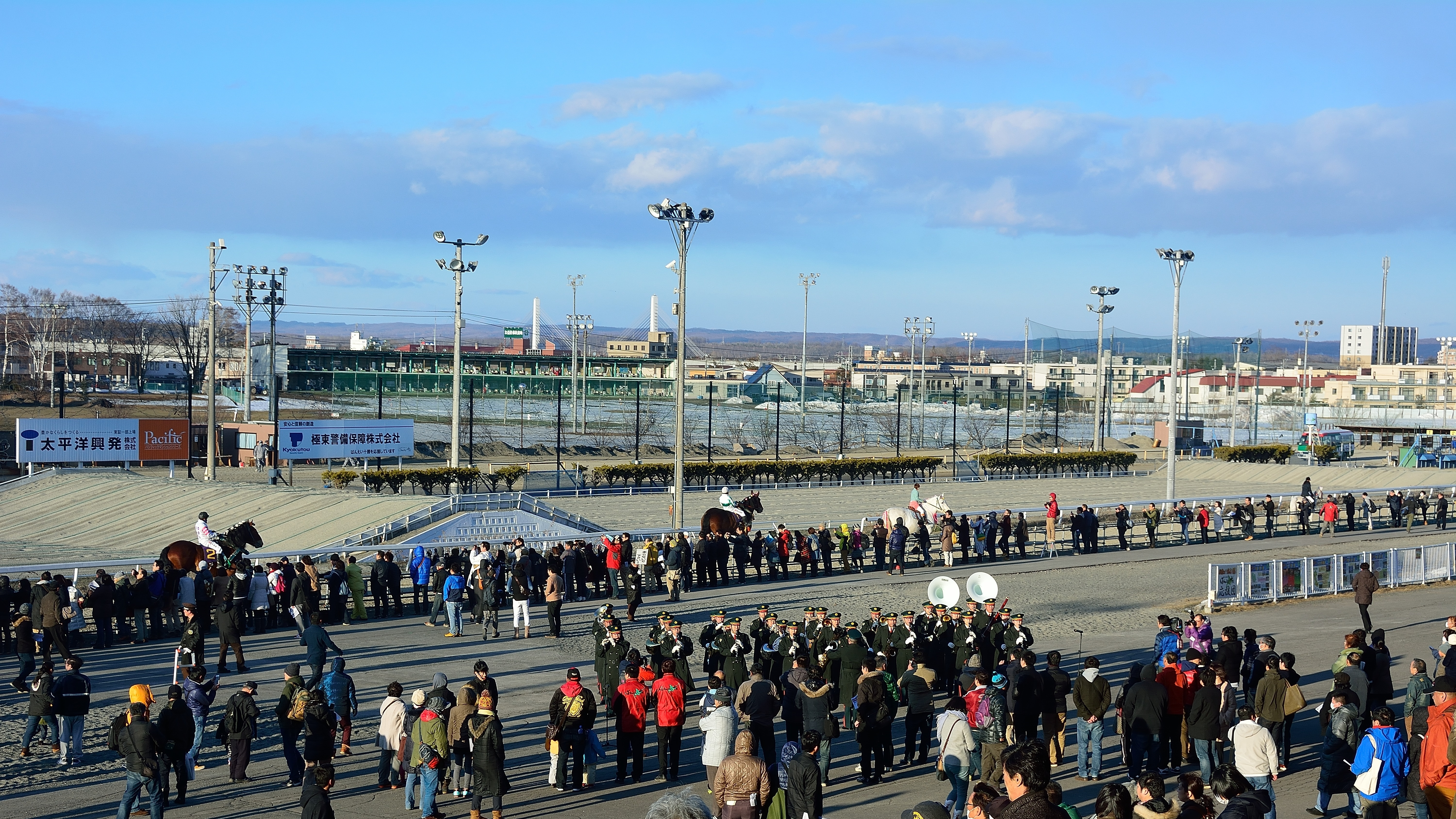 ばんえい記念の本馬場入場と演奏隊（2016年3月20日）